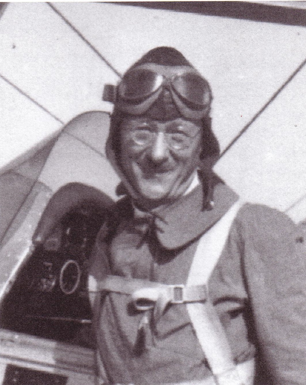 Fotografie des Chirurgen Wilhelm von Gaza